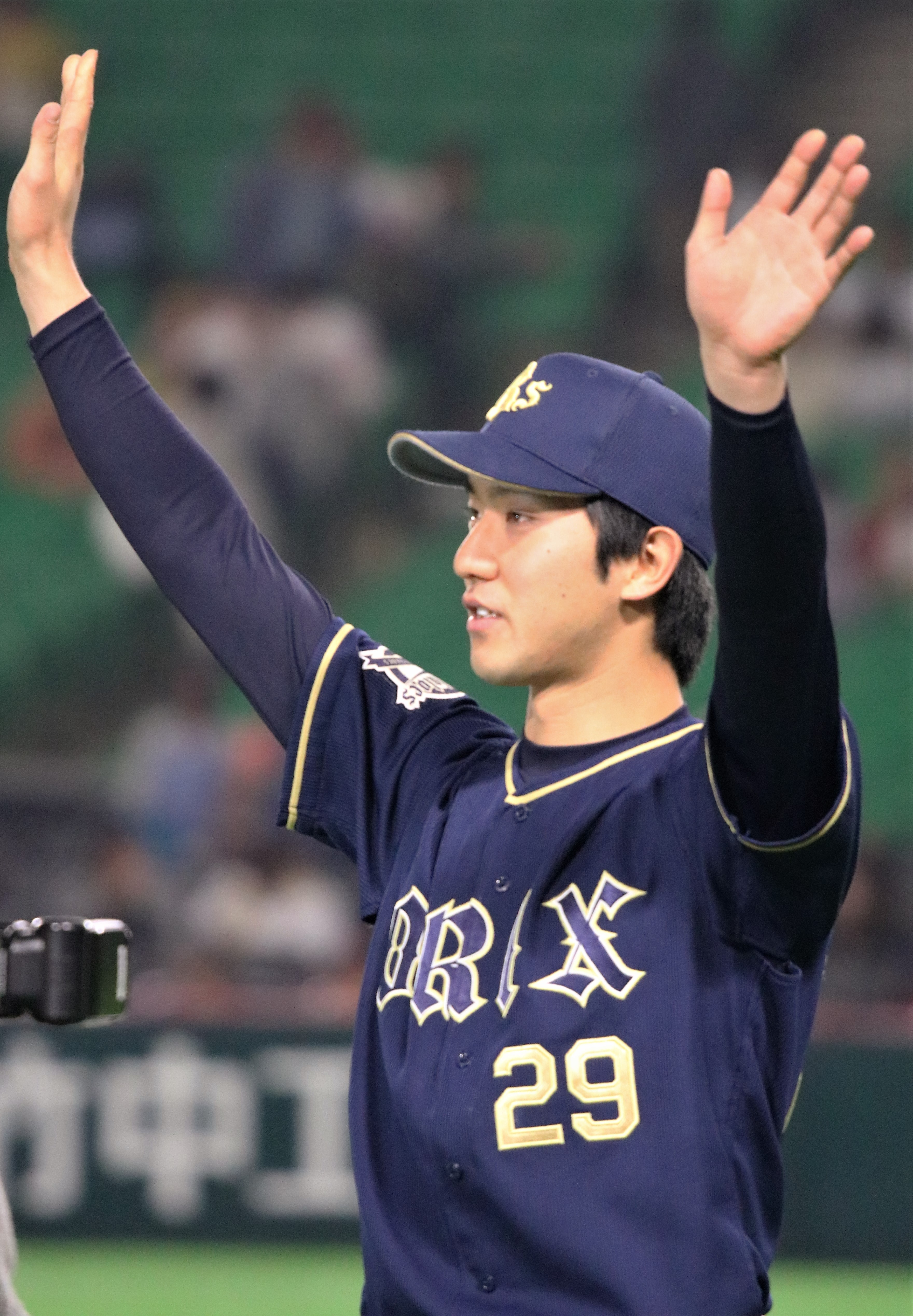 2018年3月31日福岡ソフトバンクホークス戦、初勝利後にスタンドの声援に応える。